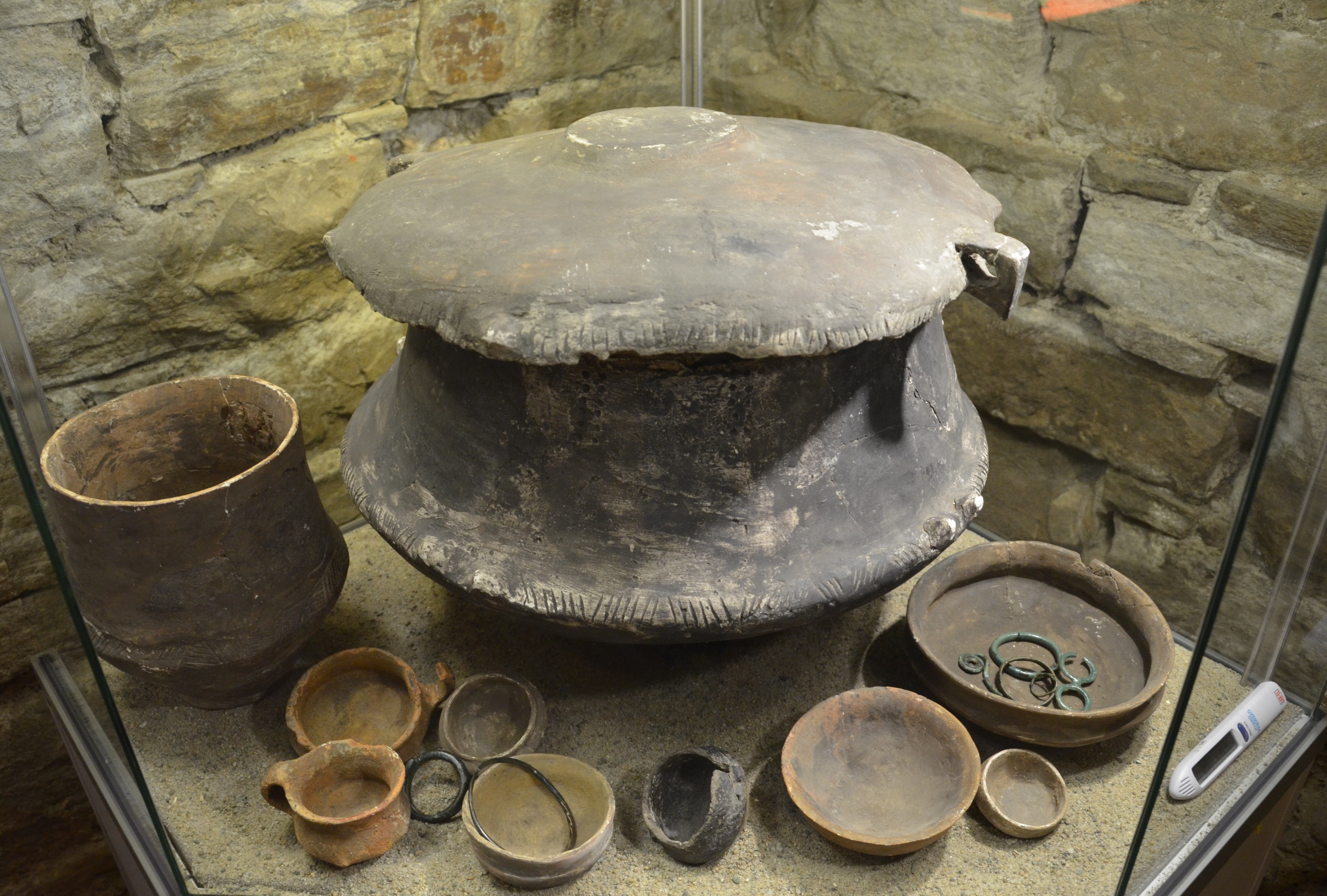 Funde der Lausitzer Kultur aus_Bachorz-Chodorowka, ausgestellt im Archäologischen Museum in Sanok